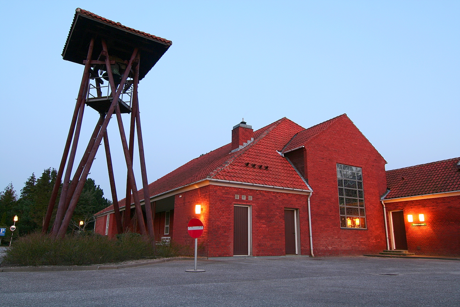 Grøndalslund Kirke